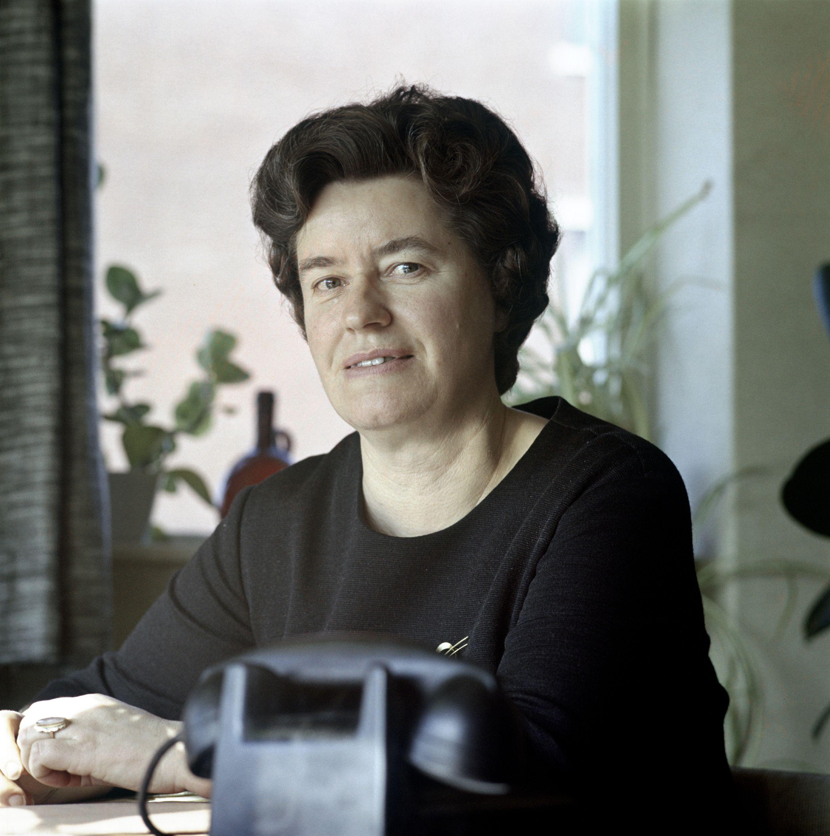 Hannie Singer-Dekker, PvdA politica, 1966.